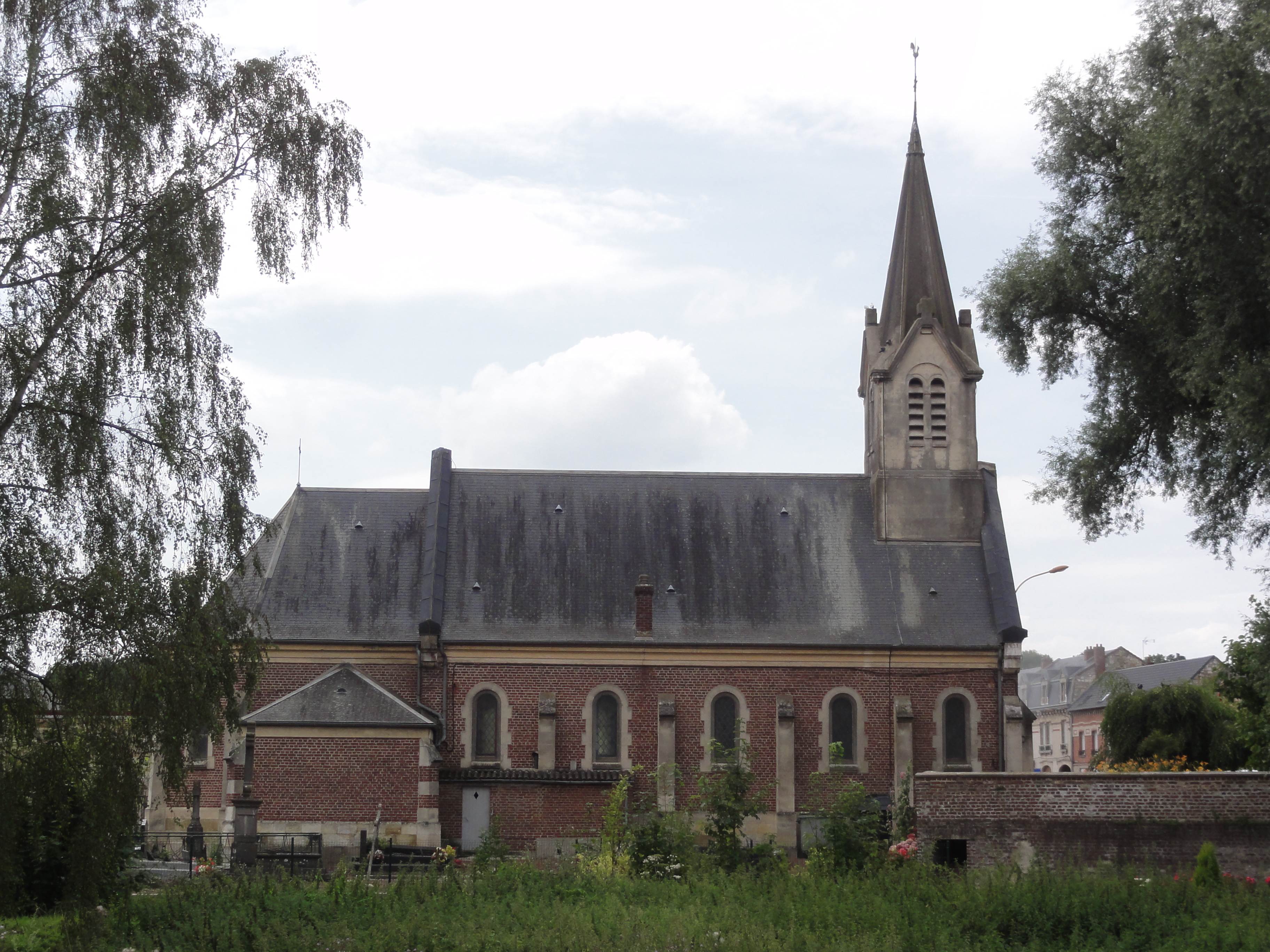 Le Catelet (Aisne) église